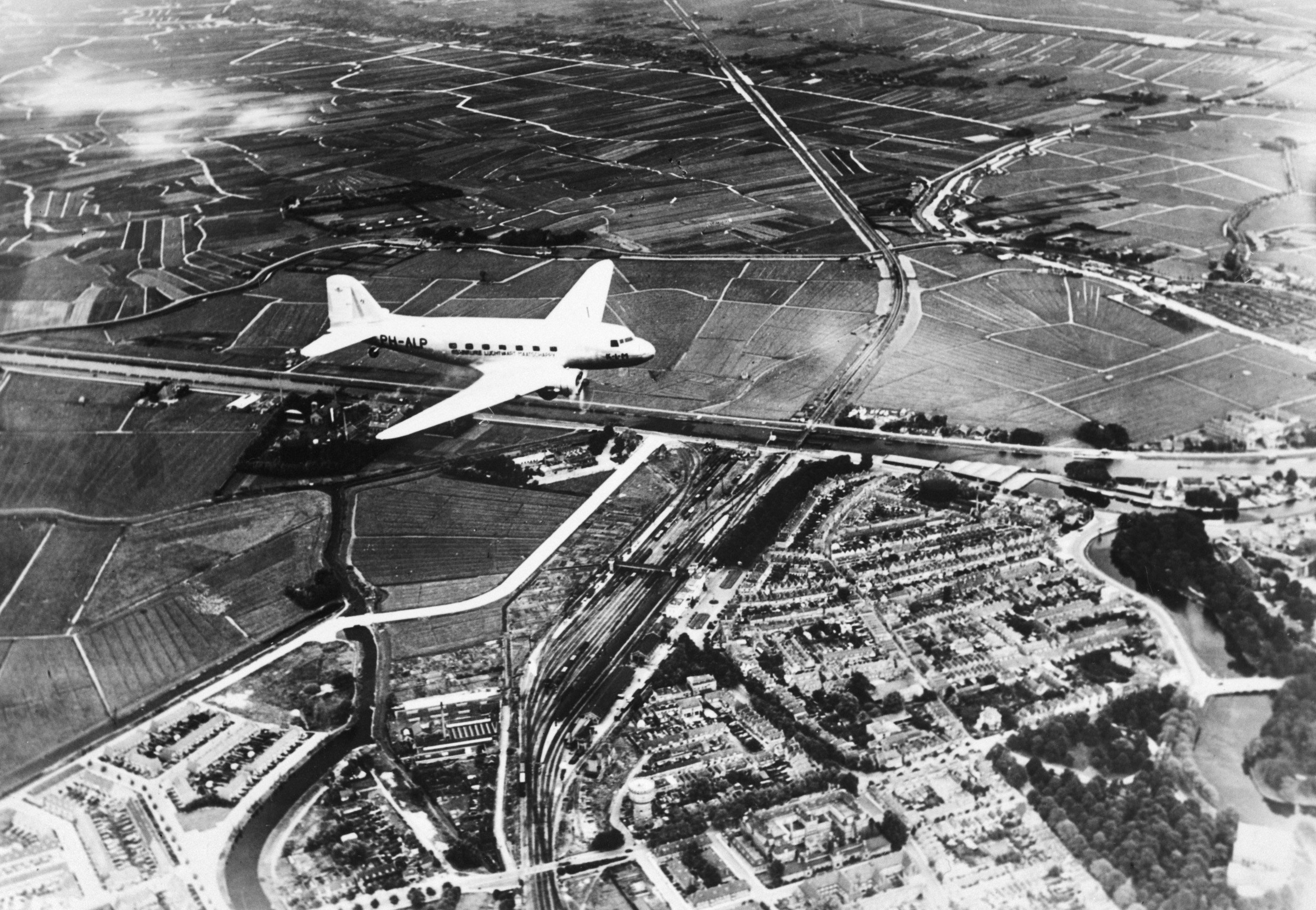 Collectie / Archief : Fotocollectie Anefo Reportage / Serie : [ onbekend ] Beschrijving : Luchtopname. Vliegtuig boven een stad en spoorwegemplacement (Alkmaar) Annotatie : Repronegatief Datum : 1940-1945 Trefwoorden : landschappen, luchtfoto's, luchtvaart, tweede wereldoorlog, vliegtuigen Fotograaf : Onbekend / Publiek Domein Auteursrechthebbende : Nationaal Archief Materiaalsoort : Negatief (zwart/wit) Nummer archiefinventaris : bekijk toegang 2.24.01.04 Bestanddeelnummer : 935-3546